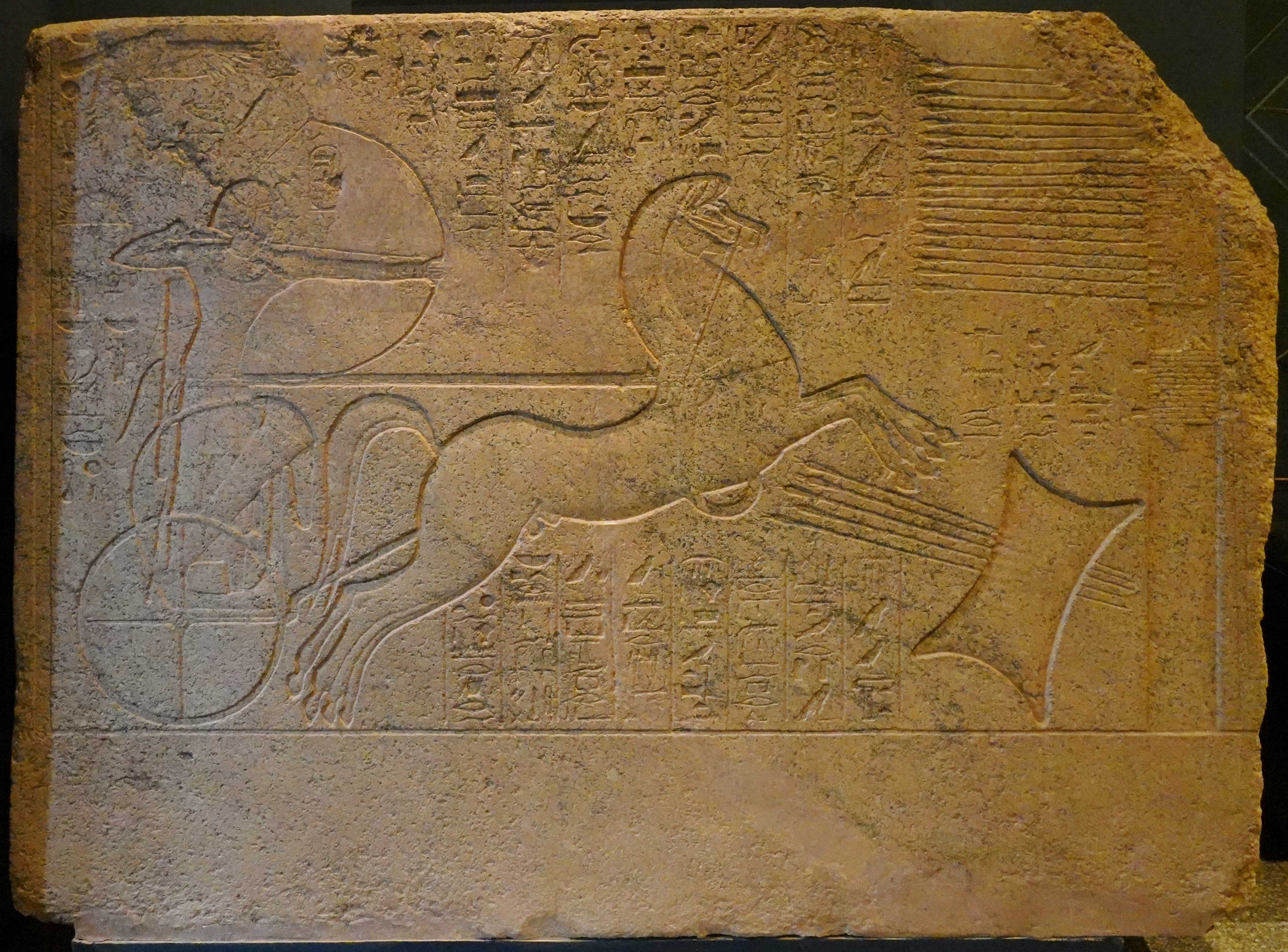 Relief des Königs Amenophis II. bei Zielübungen auf seinem Streitwagen (Rosengranit, 18. Dynastie), gefunden in Karnak, ausgestellt im Luxor-Museum, Ägypten